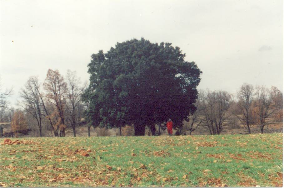 vista de una gran encina. User:Carlosblh